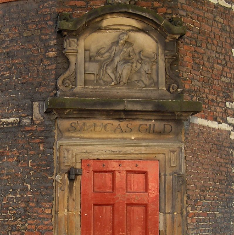 Amsterdam Wall